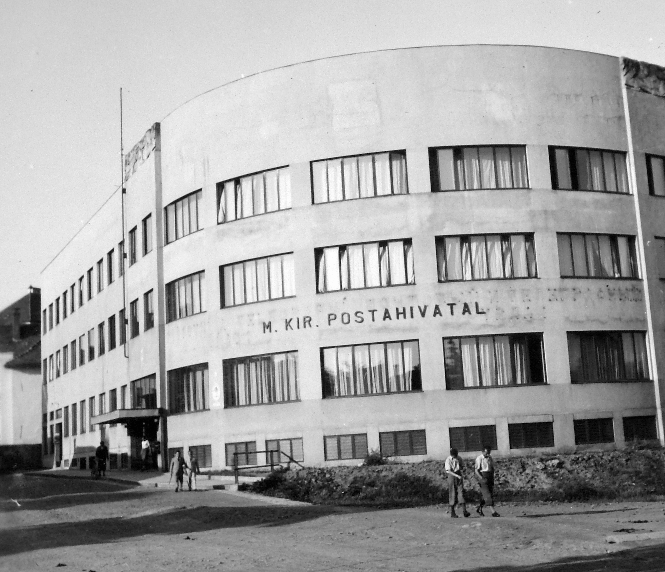 Postahivatal. Location: Ukraine, Uzhgorod Tags: post office, Transcarpathia Title: Postahivatal.